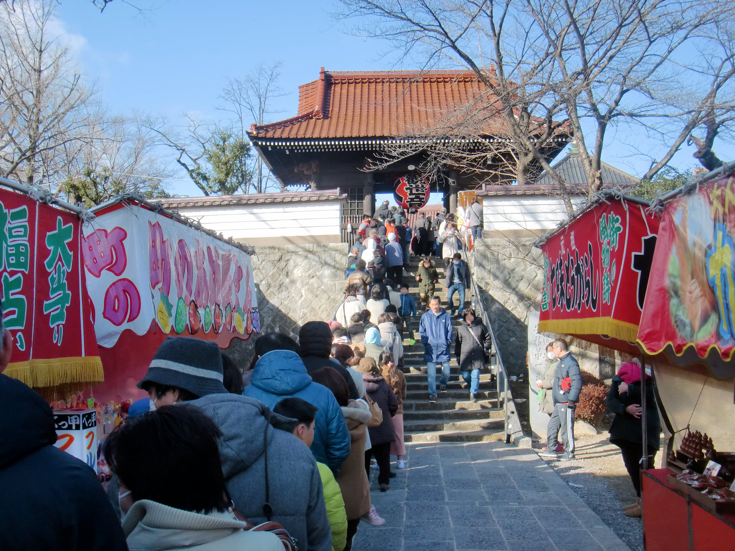 郡山市の如宝寺 2018年 七日堂参り 参道付近の様子